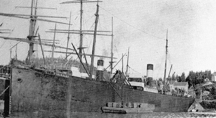 FLK «Admiralen» var det første moderne flytende hvalkokeriet og ble i sesongen 1905/06 det første kokeriet som opererte i Antarktis. Bildet er fra sommeropplag i hjembyen Sandefjord.